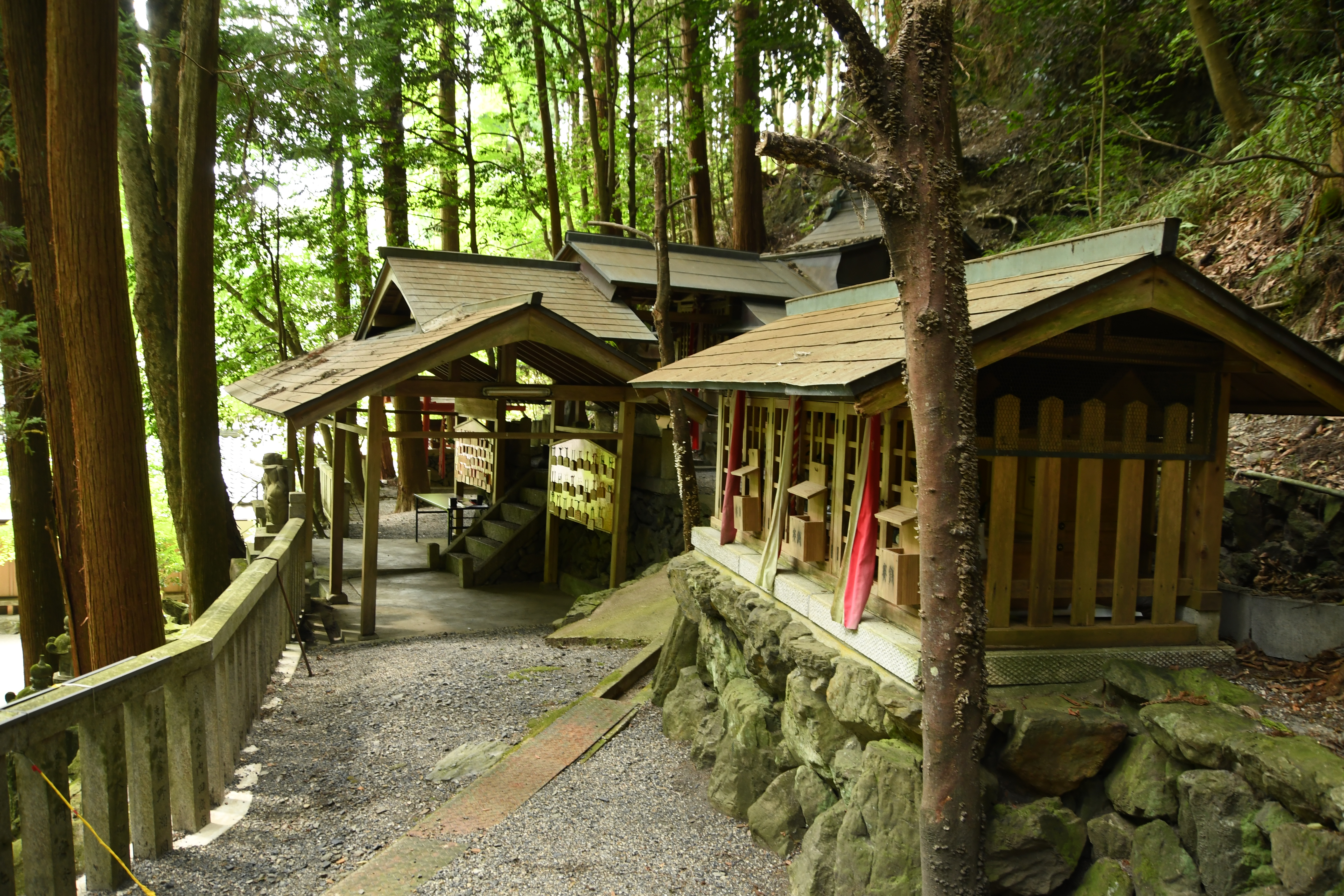 京都府宇治田原町大字湯屋谷 大神宮社（茶宗明神社）。2018年8月5日撮影。